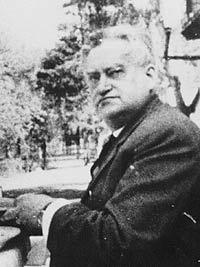 Premier rządu londyńskiego Stanisław Cat-Mackiewicz